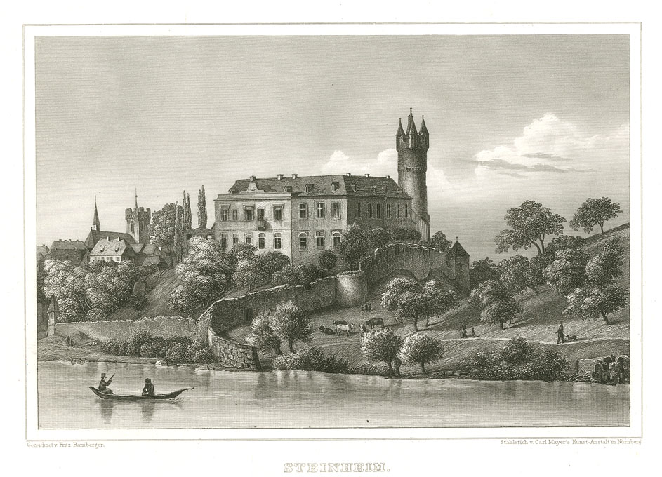 Steinheim. Stahlstich nach Vorzeichnung von Fritz Bamberger, 1847, aus: Ludwig Braunfels; Die Mainufer und ihre nächsten Umgebungen. Verlag Carl Etlinger, Würzburg 1847. Gedruckt in der Kunstanstalt von Carl Mayer, Nürnberg.